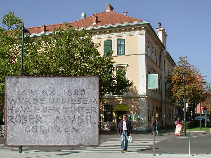 Robert Musil Geburtshaus mit Gedenktafel in der Bahnhofstraße 50 in Klagenfurt. brIn diesem Haus sind das Robert Musil Literatur Museum und das Robert Musil-Institut für Literaturforschung untergebracht.